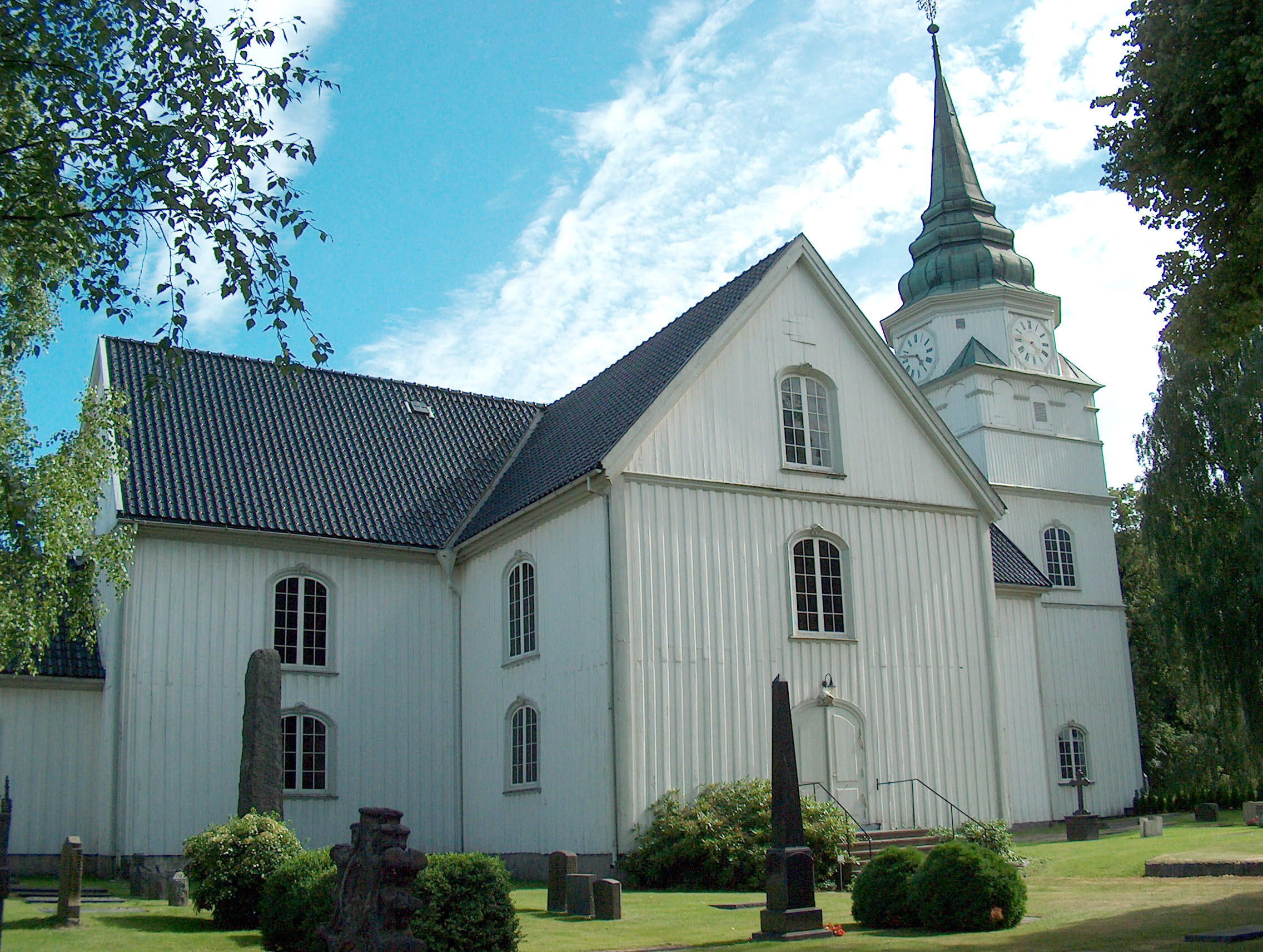 Østre Porgsrunn kirke, sett fra nord, før brannen i 2011